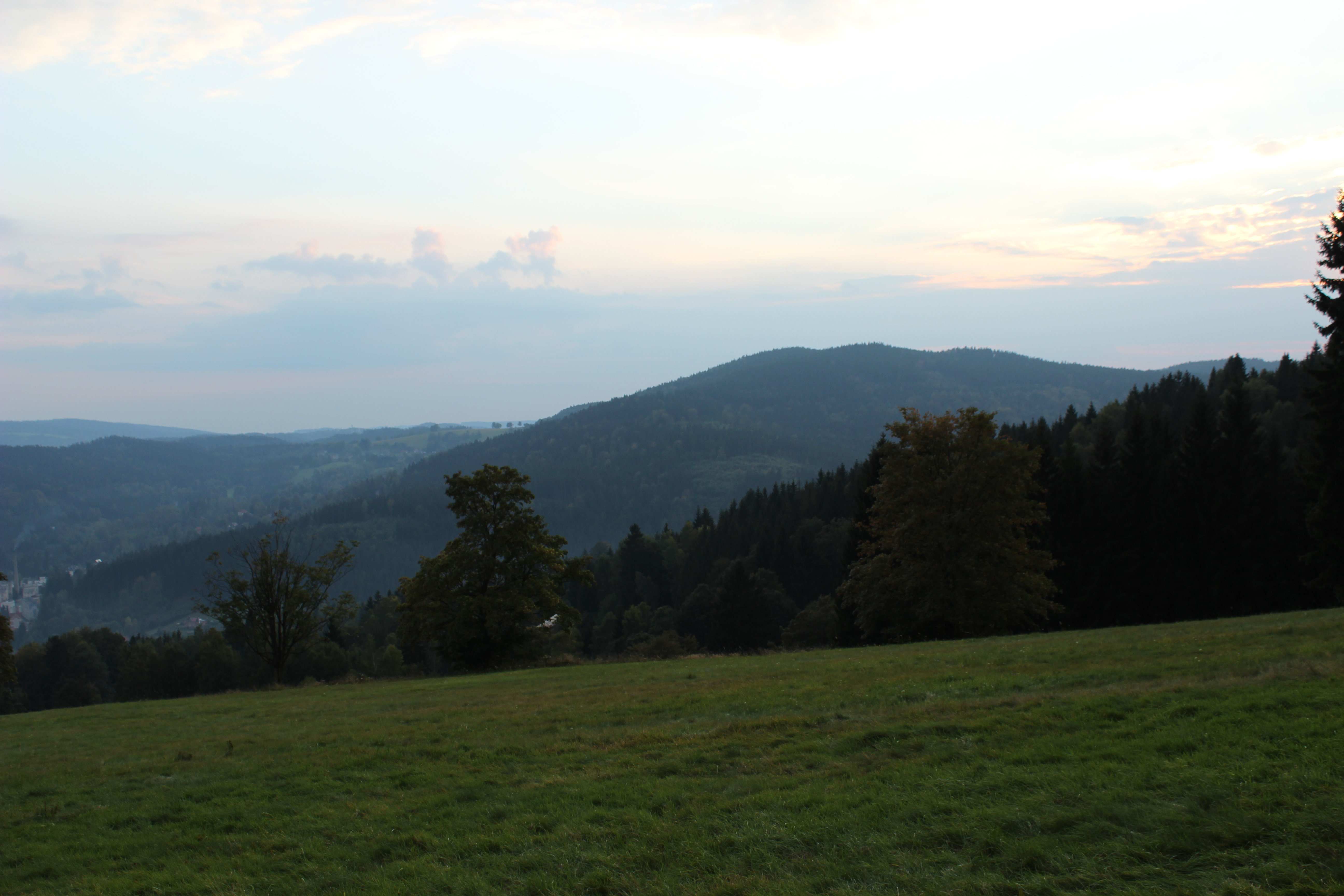 Pohled na Bukovou z vyhlídky na Mariánských Horách.